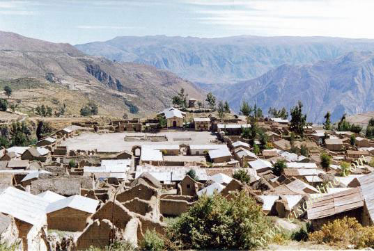 Corculla